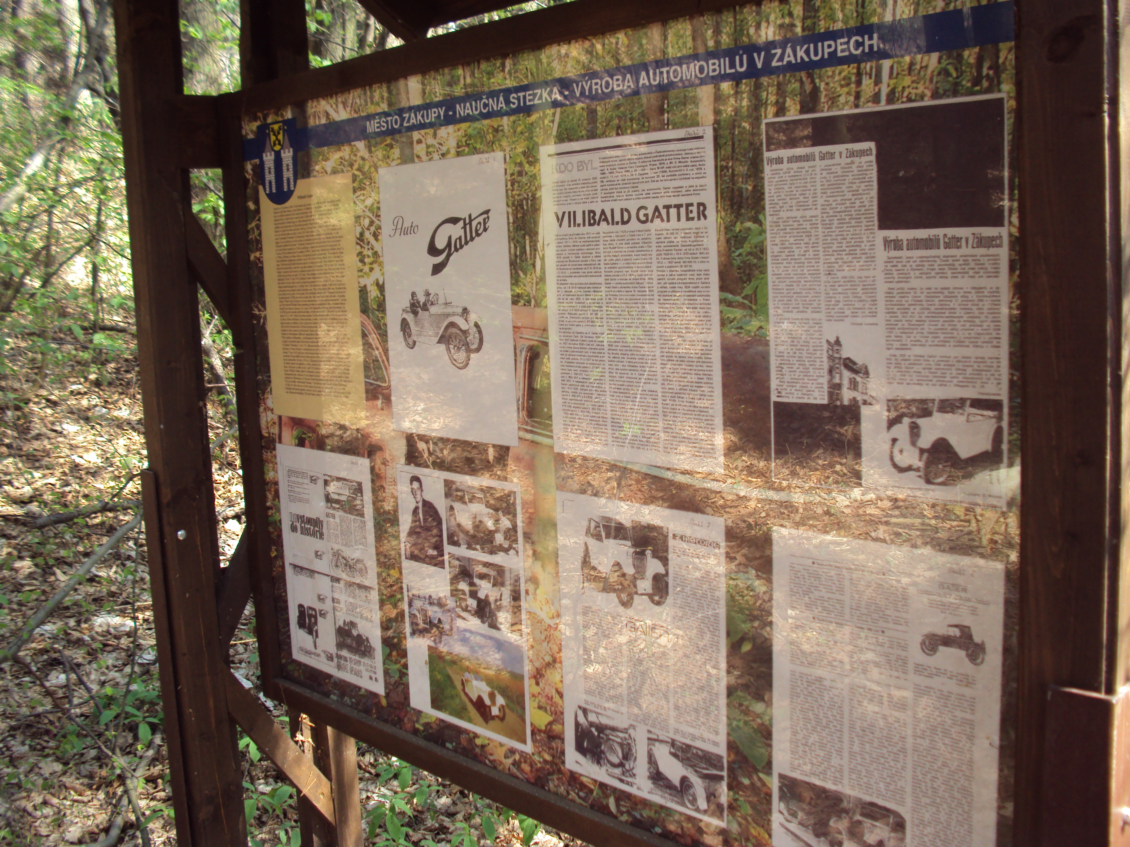 Jeden z panelů na naučné stezce Zákupy je věnován konstruktéru aut Williamu Gatterovi